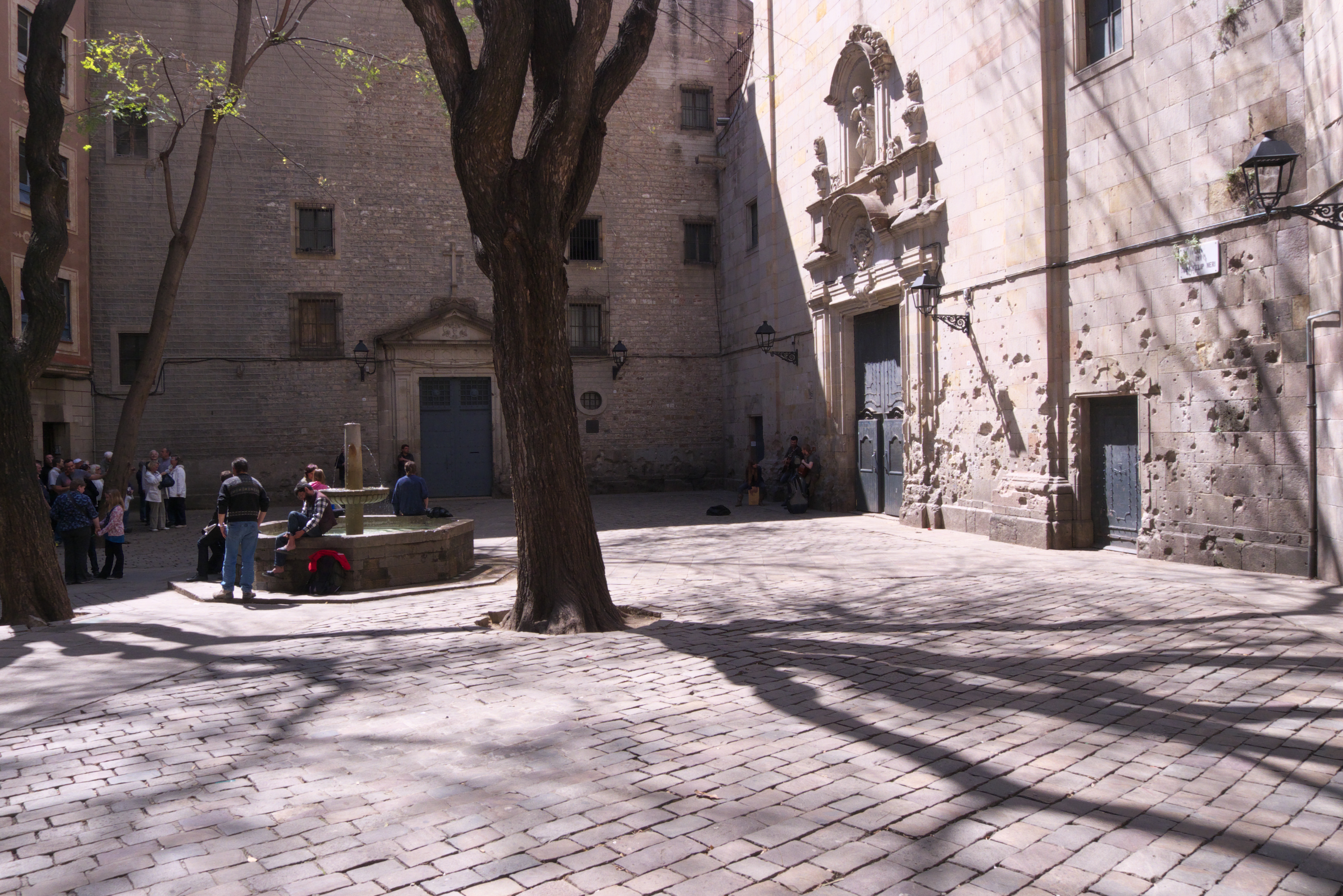 Plaza del Barrio Gótico